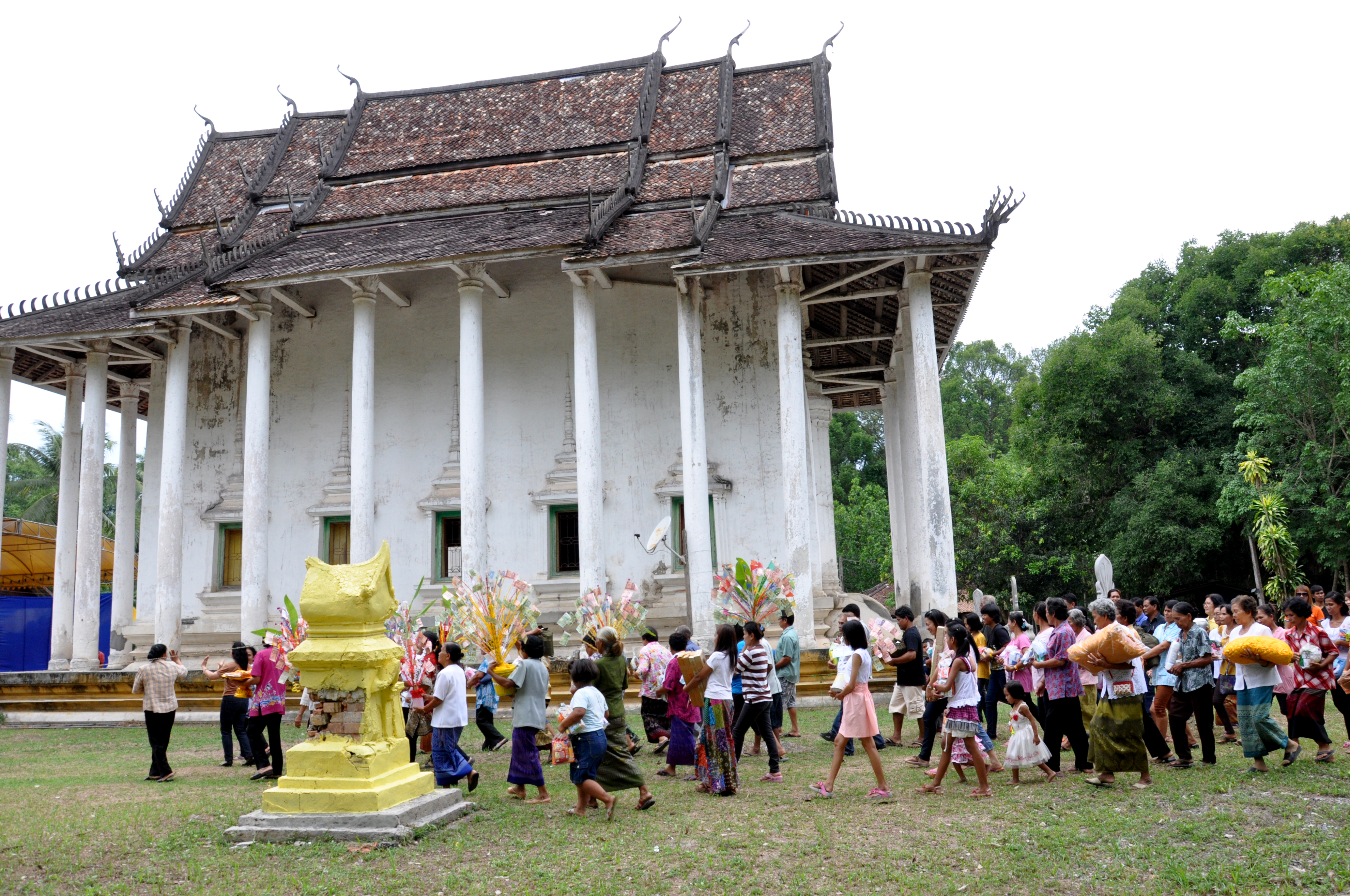 วัดเทพนิมิต